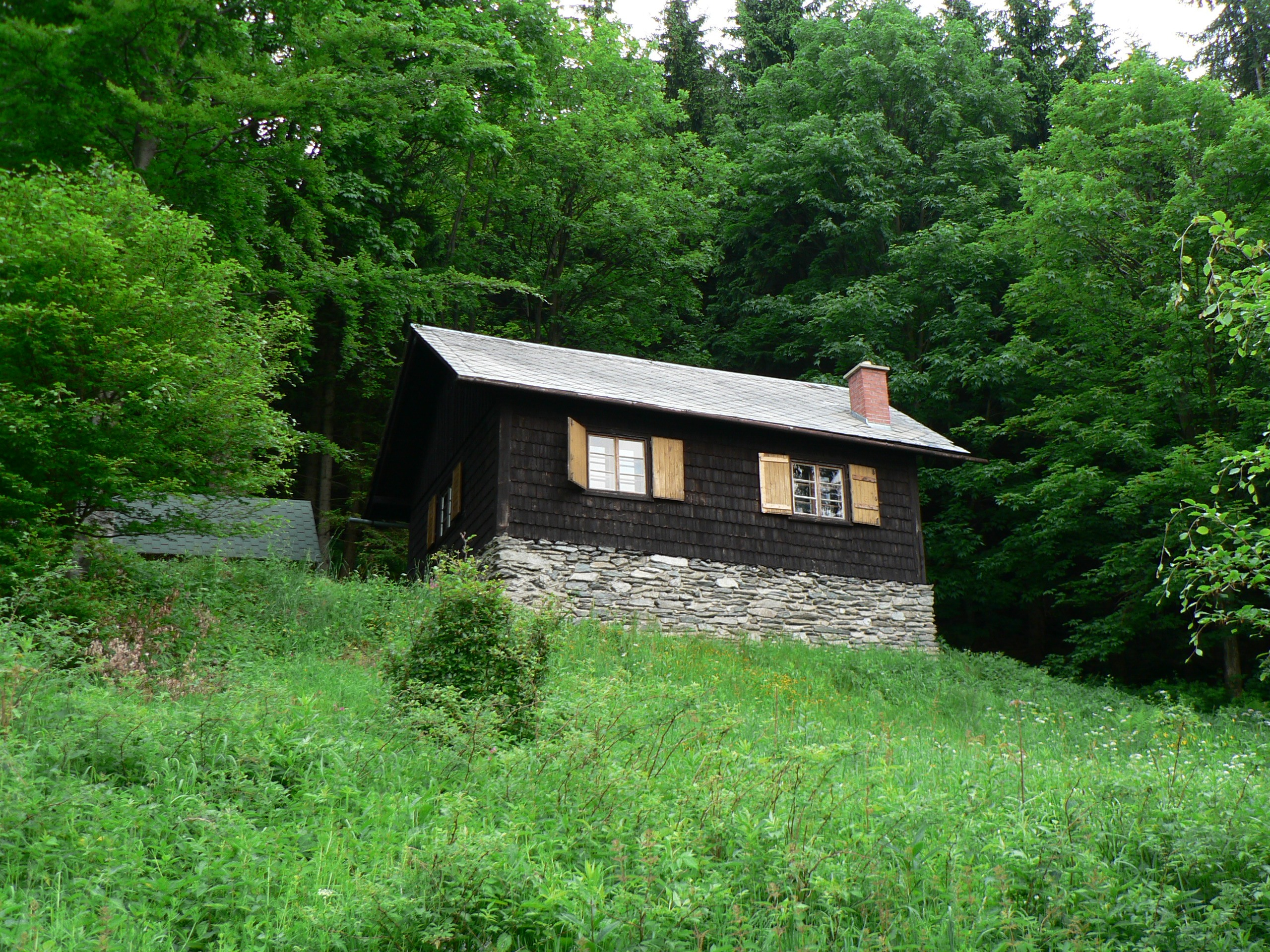 Solná chata - lovecká chata na svazích Medvědího vrchu v Hrubém Jeseníku